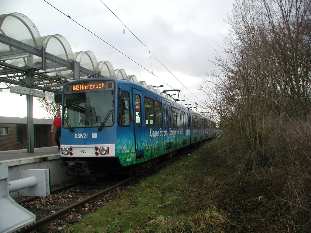 DSW Tw 405 an der Haltestelle Grevel